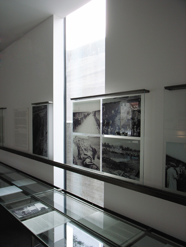 Ansicht aus der ständigen Ausstellung "KZ Gusen 1939–45"